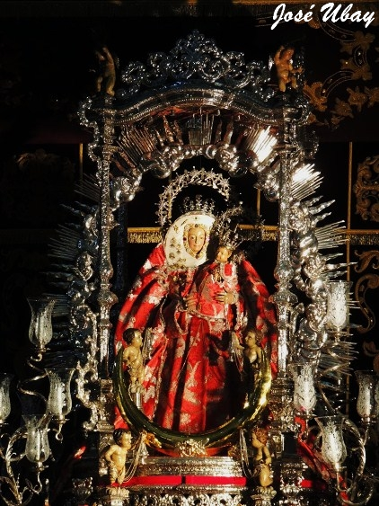 Nuestra Señora del Pino, Patrona de la Diócesis de Canarias.